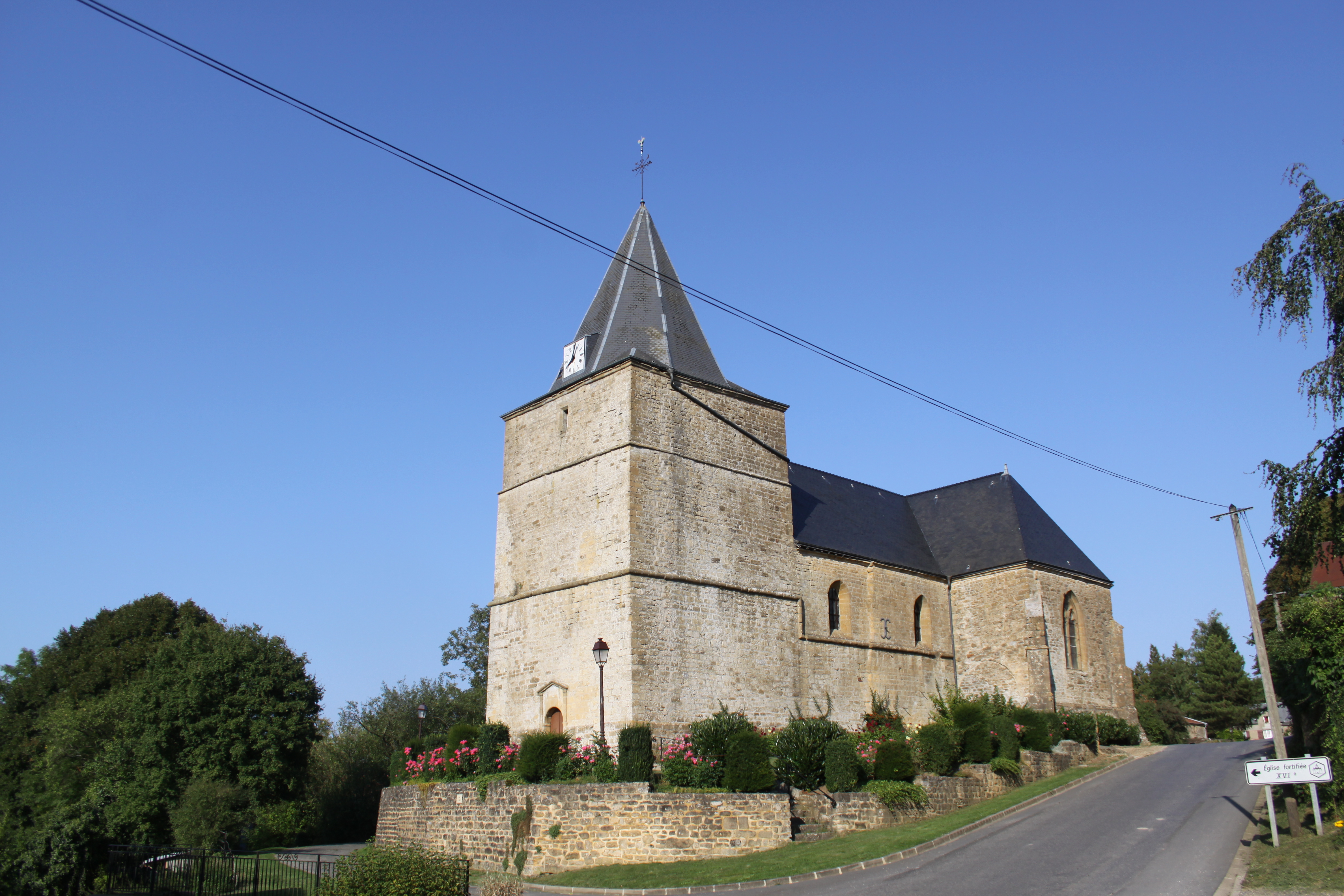 Église Saint-Martin de Remilly-les-Pothées (Ardennes, France) .